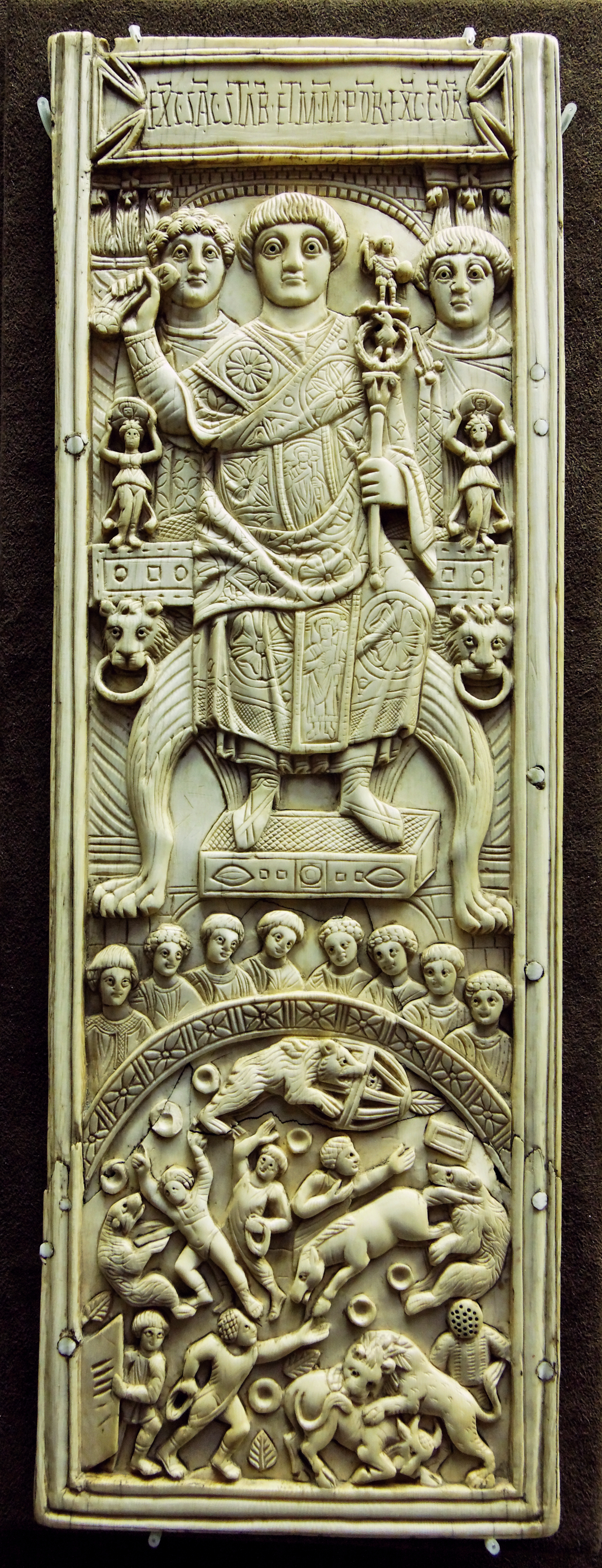 Feuillet d'un diptyque en ivoire sur lequel est représenté le consul Areobindus président les jeux Origine : Constantinople, vers 506 Classement : 13135